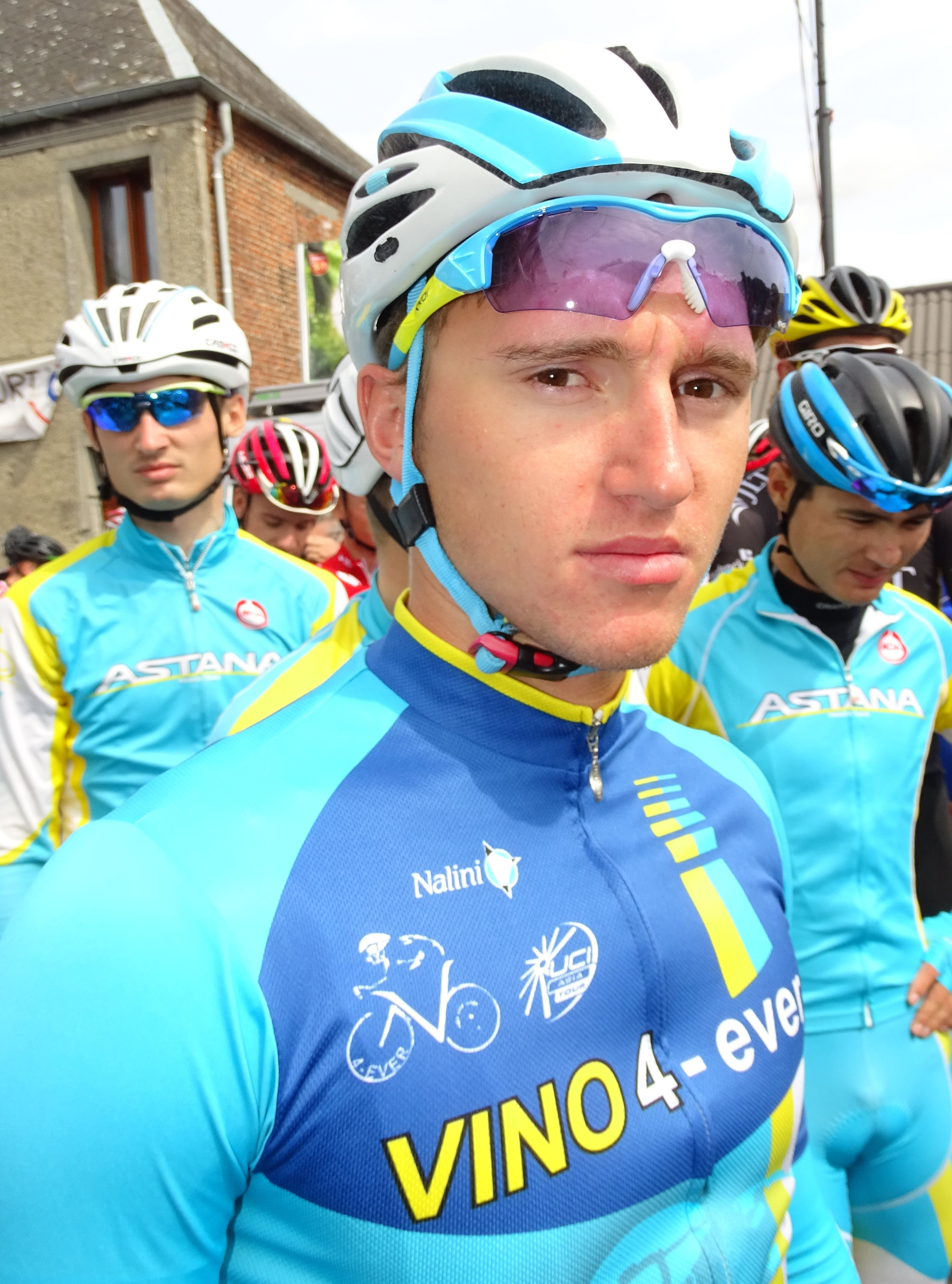 Reportage réalisé le mardi 25 août à l'occasion du départ et de l'arrivée du Grand Prix des Marbriers 2015 à Bellignies, Nord-Pas-de-Calais, France.